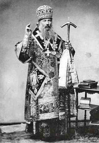 Митрополит Белокриницкий Макарий. Егорьевск: Светописаная мастерская Н. Д. Зенина